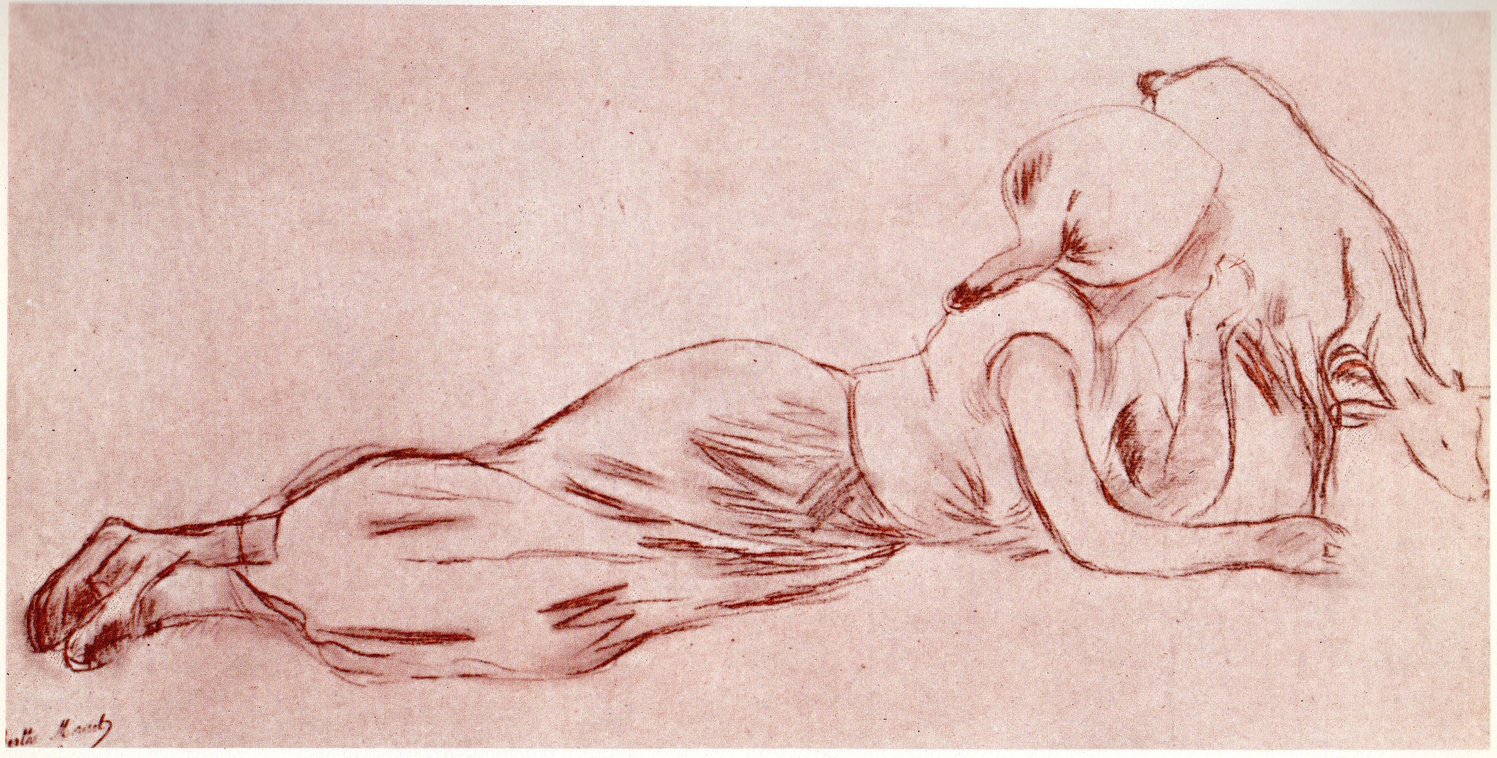 Aktstudie eines liegenden Bauernmädchens, Technik: Rötelzeichnung, Format: 15 x 23 cm